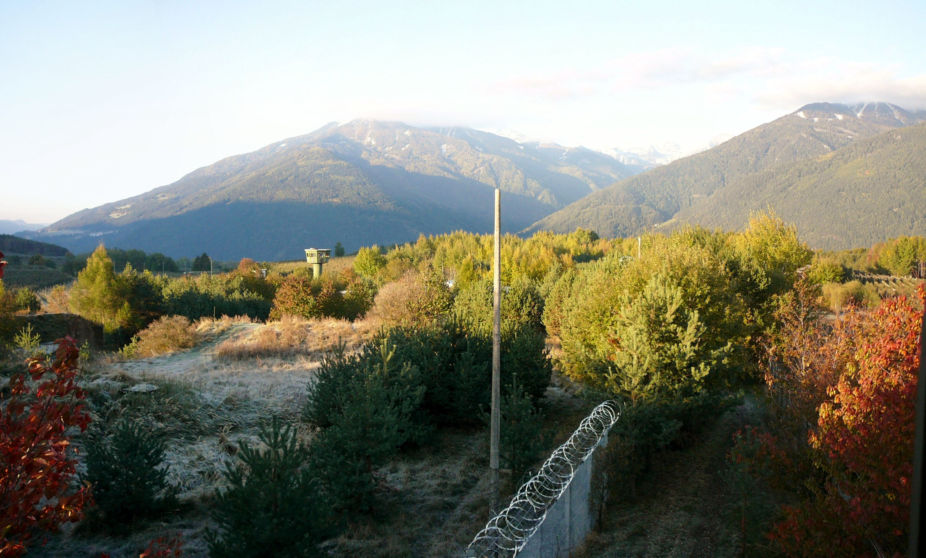 Site Rigel